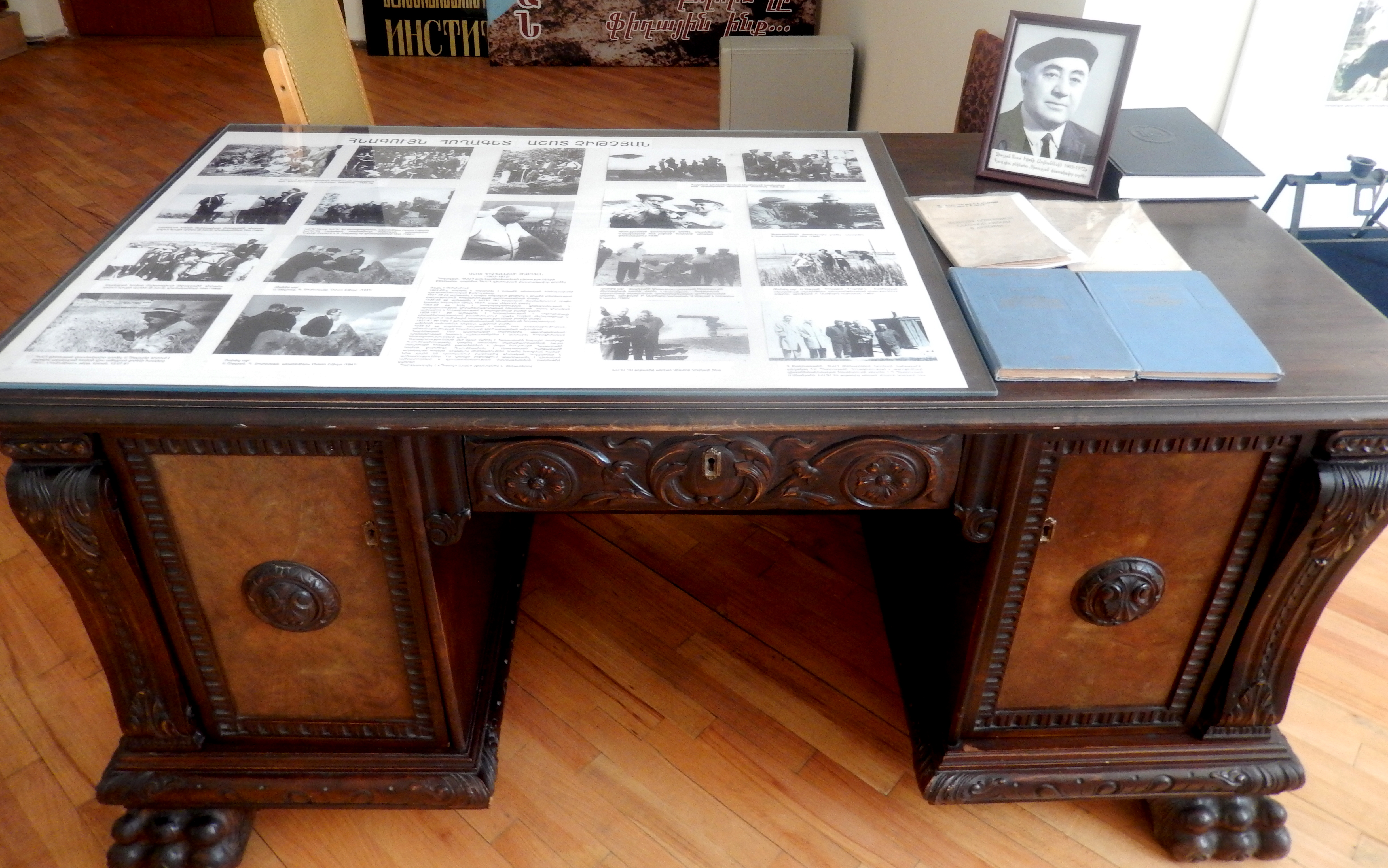 Աշոտ Չիթչյանի գրասեղանը ՀԱԱՀ Պատմության թանգարանում 6/2